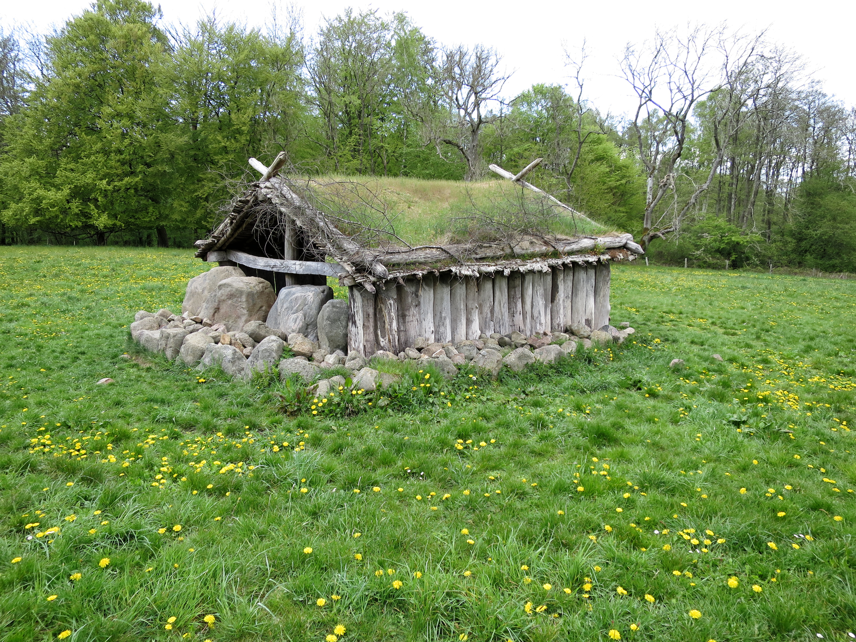 Tustruphuset på Moesgård - et kulthus fra bondestenalderen.